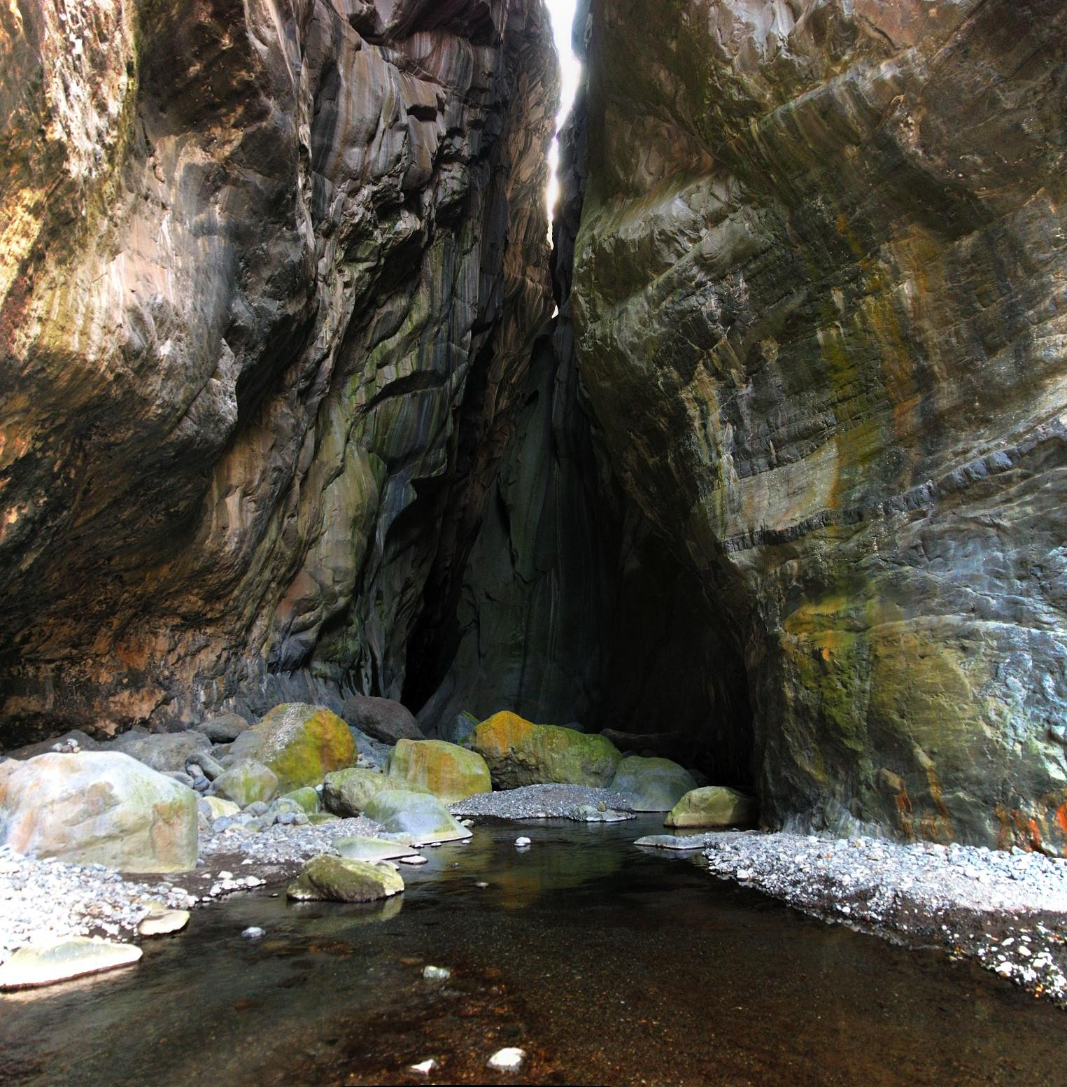 La Chapelle, massif de Syénite, peu courante à la Réunion la Syénite correspondant à du volcanisme très explosif